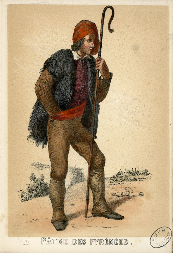 Album dépliant de 25 lithographies aquarellées et gommées Ancely, René (1876 - 1966). Possesseur